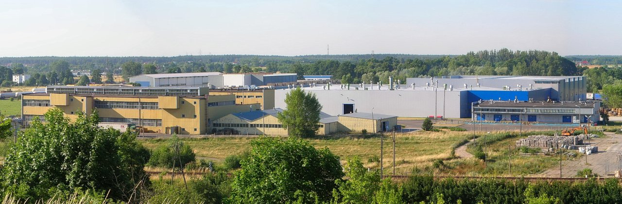 Zakład przemysłowy na Osowej Górze w Bydgoszczy